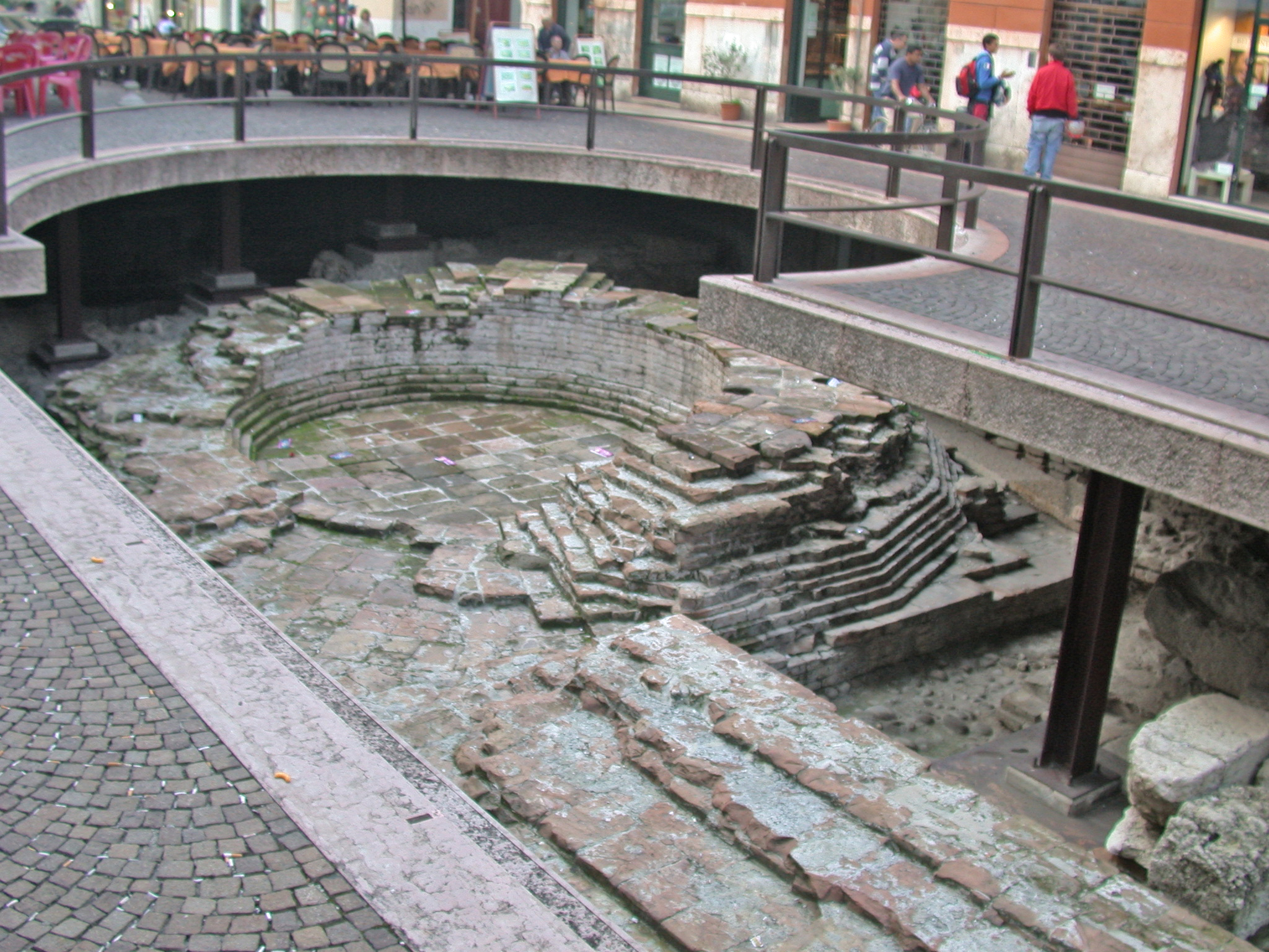 Verona, "Porta dei Leoni" (roman city gate): archeological remains